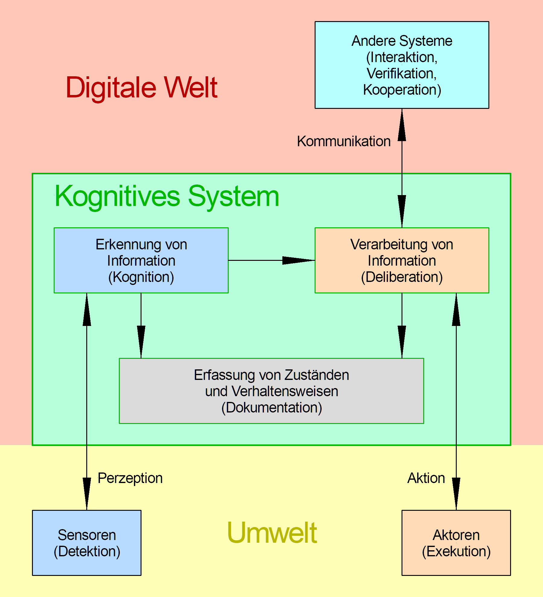 Beispielschema eines kognitiven Systems Mit Sensoren, wie zum Beispiel Kameras oder Temperaturfühlern, können Signale aus der Umwelt detektiert werden. Für die Perzeption werden diese Signale durch die Kognition des kognitiven Systems erkannt und in digitale Information umgewandelt. Diese Information kann dokumentiert werden und wird verarbeitet. Das Ergebnis der Deliberation kann ebenfalls dokumentiert werden und dient zur Steuerung und Ausführung („Exekution“) einer Aktion in der Umwelt mit Hilfe von Aktoren. Wenn es eine Rückkopplung zwischen den Aktoren und den Sensoren gibt, kann das kognitive System einen digitalen Regelkreis bilden. Typischerweise kommunizieren kognitive Systeme mit anderen Systemen, um Daten auszutauschen, zu verifizieren oder zu validieren. Durch eine geeignete Kooperation können mehrere Systeme gleichzeitig in der digitalen und realen Welt wirken. Menschen können über Mensch-Maschine-Schnittstellen mit kognitiven Systemen interagieren.